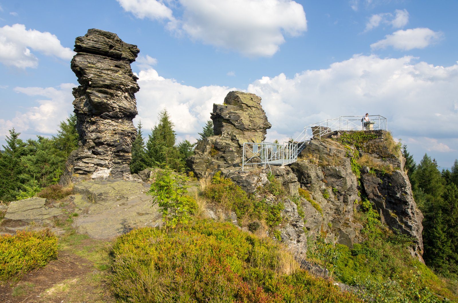 Přírodní památka Vysoký kámen, Krušné hory, okres Sokolov